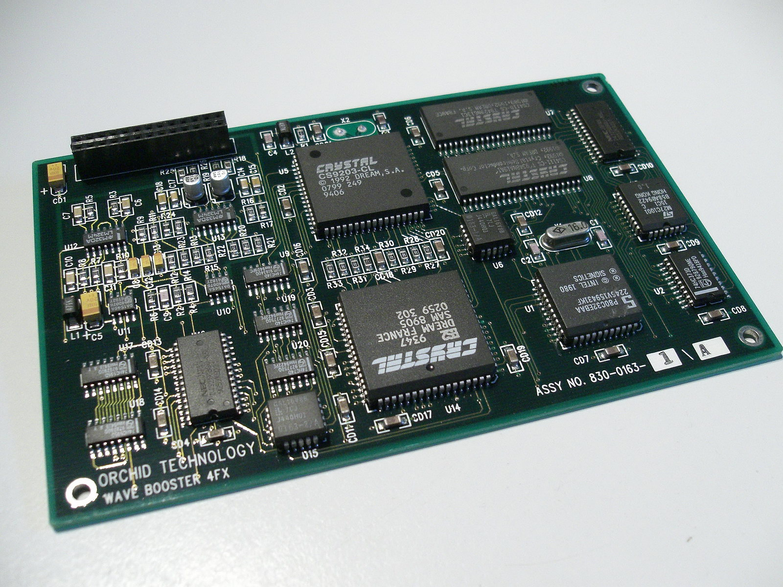 Orchid Wave Booster 4FX - Wavetable Huckepack-Platine für Soundblaster 16